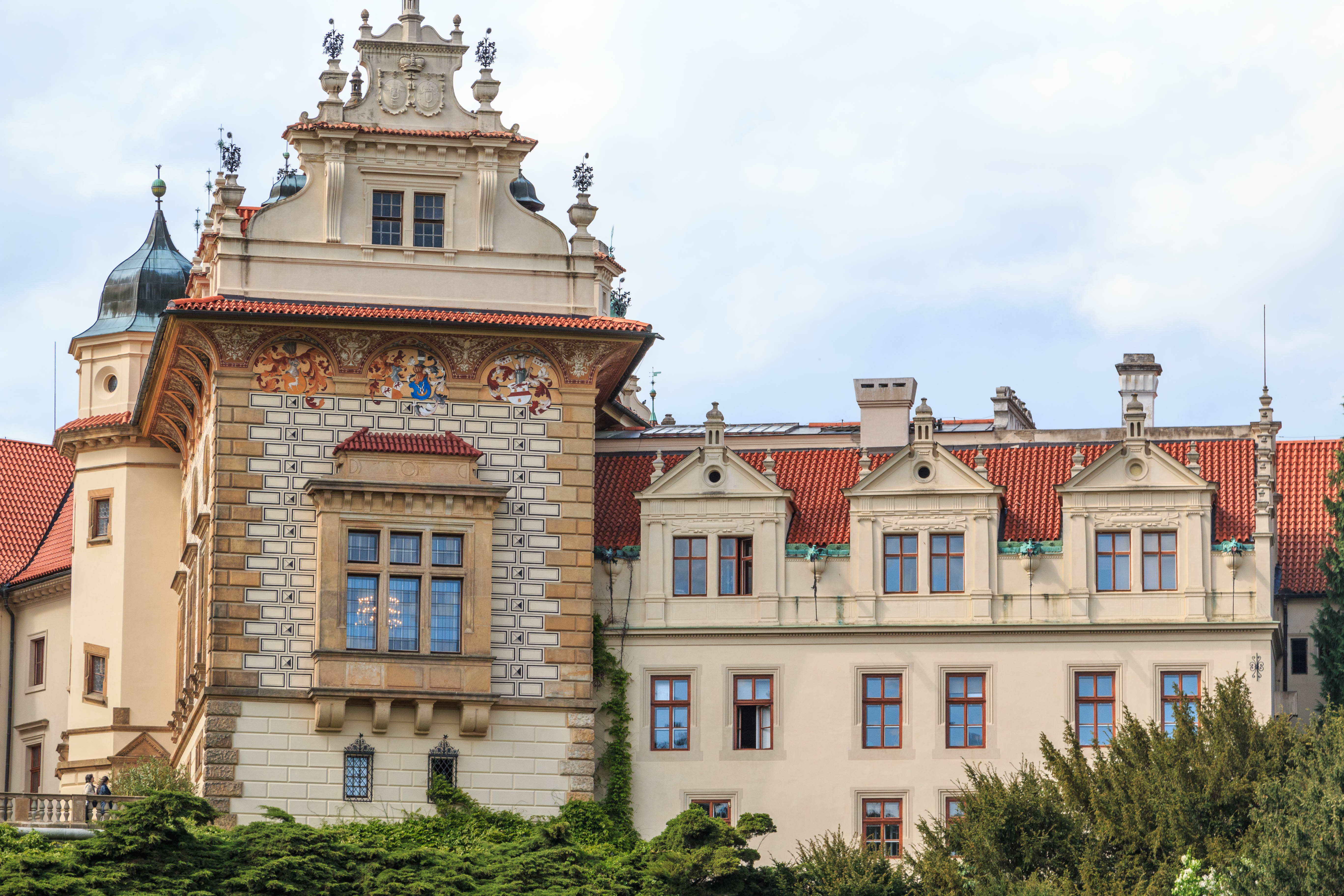 Zámek Průhonice, Průhonice, Osnice, Zdiměřice, Dobřejovice, Průhonice. Project: Chráněná území. Zámek Průhonice od Podámeckého rybníka